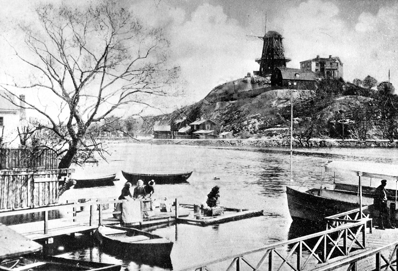 Bryggor där Bondegatan mynnar vid Hammarby strand. T.h. S/S Nackanäs. Danviksklippan med kvarnen i fonden